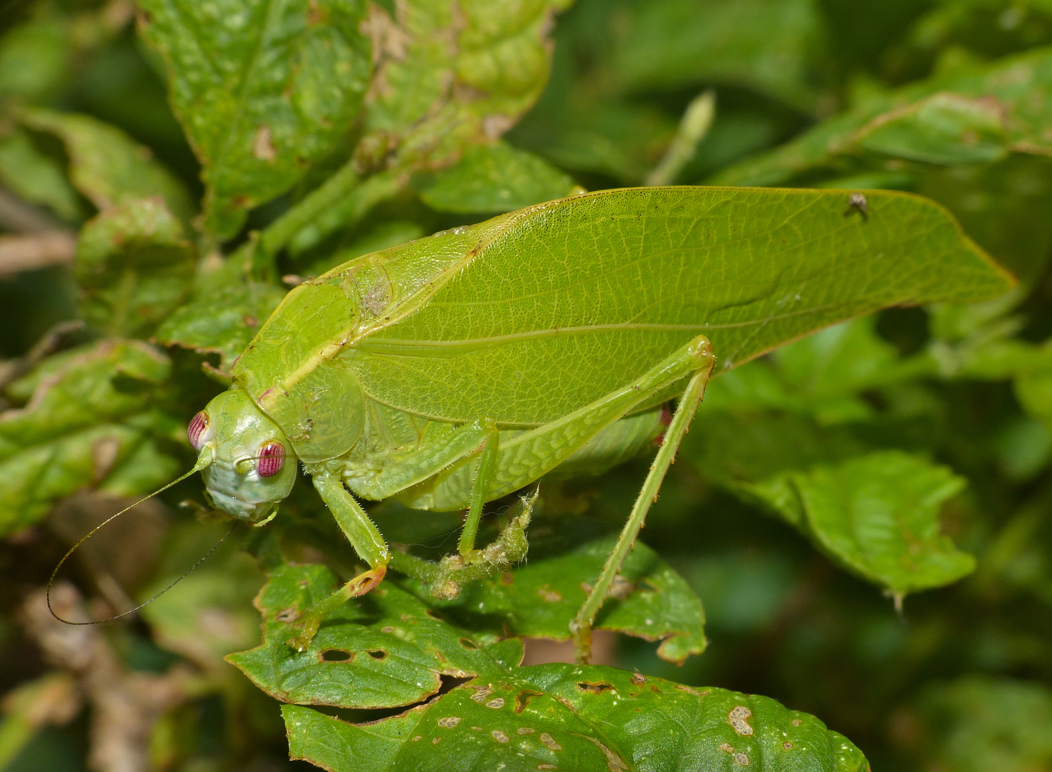 Letaba Camp, Kruger NP, SOUTH AFRICA